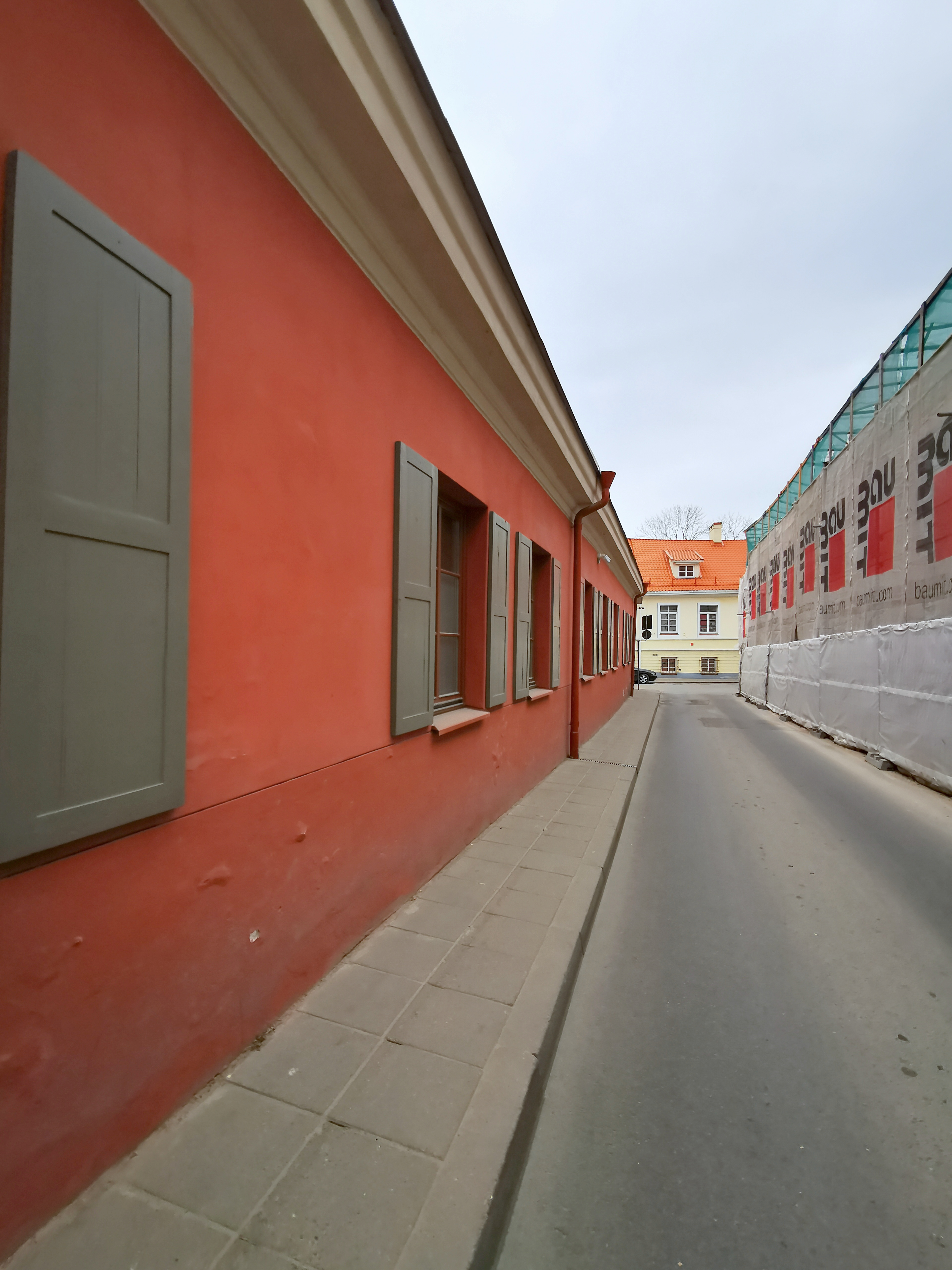 Latako gatvė